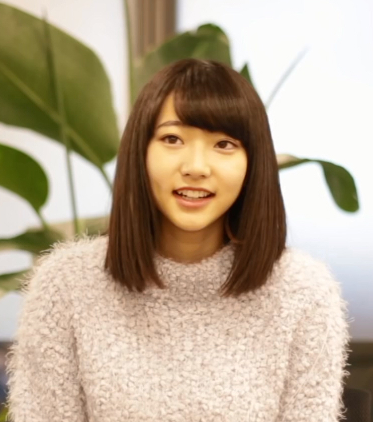 (EXCLUSIVE INTERVIEW) 15 hal yang perlu kamu ketahui dari Rena Takeda (武田玲奈)!